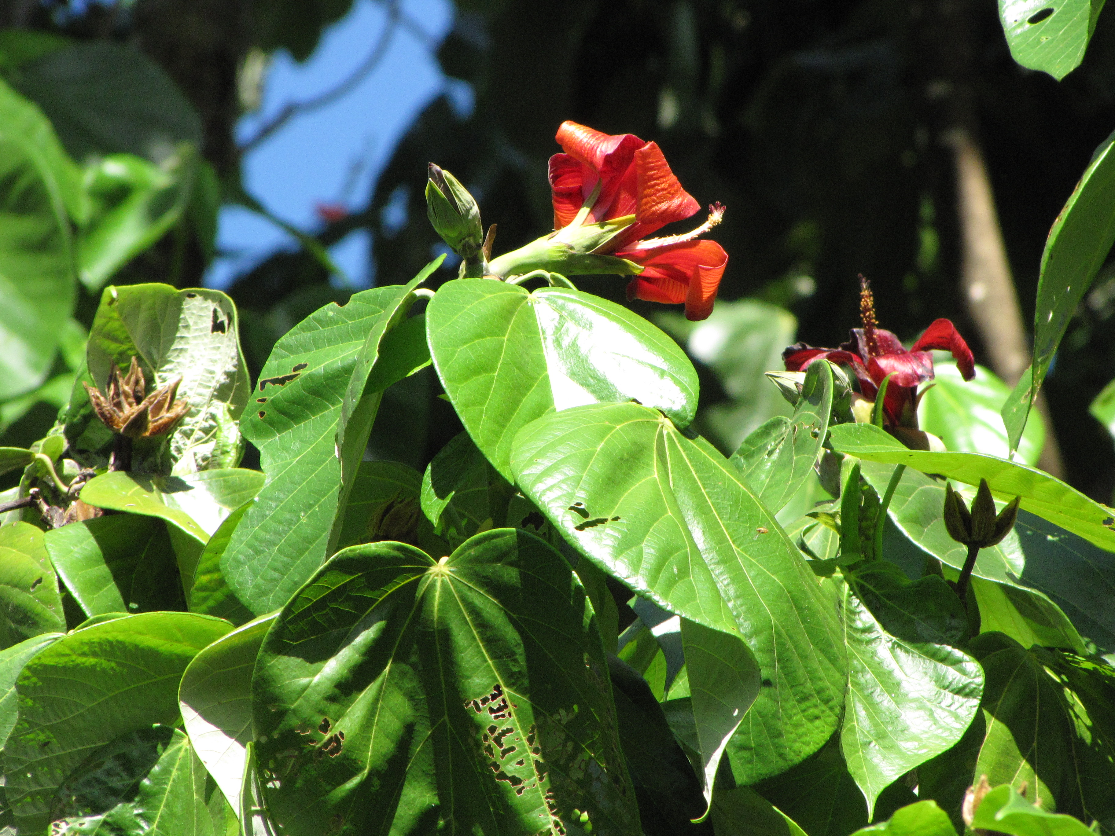 Talipariti elatum, at Kahanu Gardens NTBG Kaeleku Hana, Maui